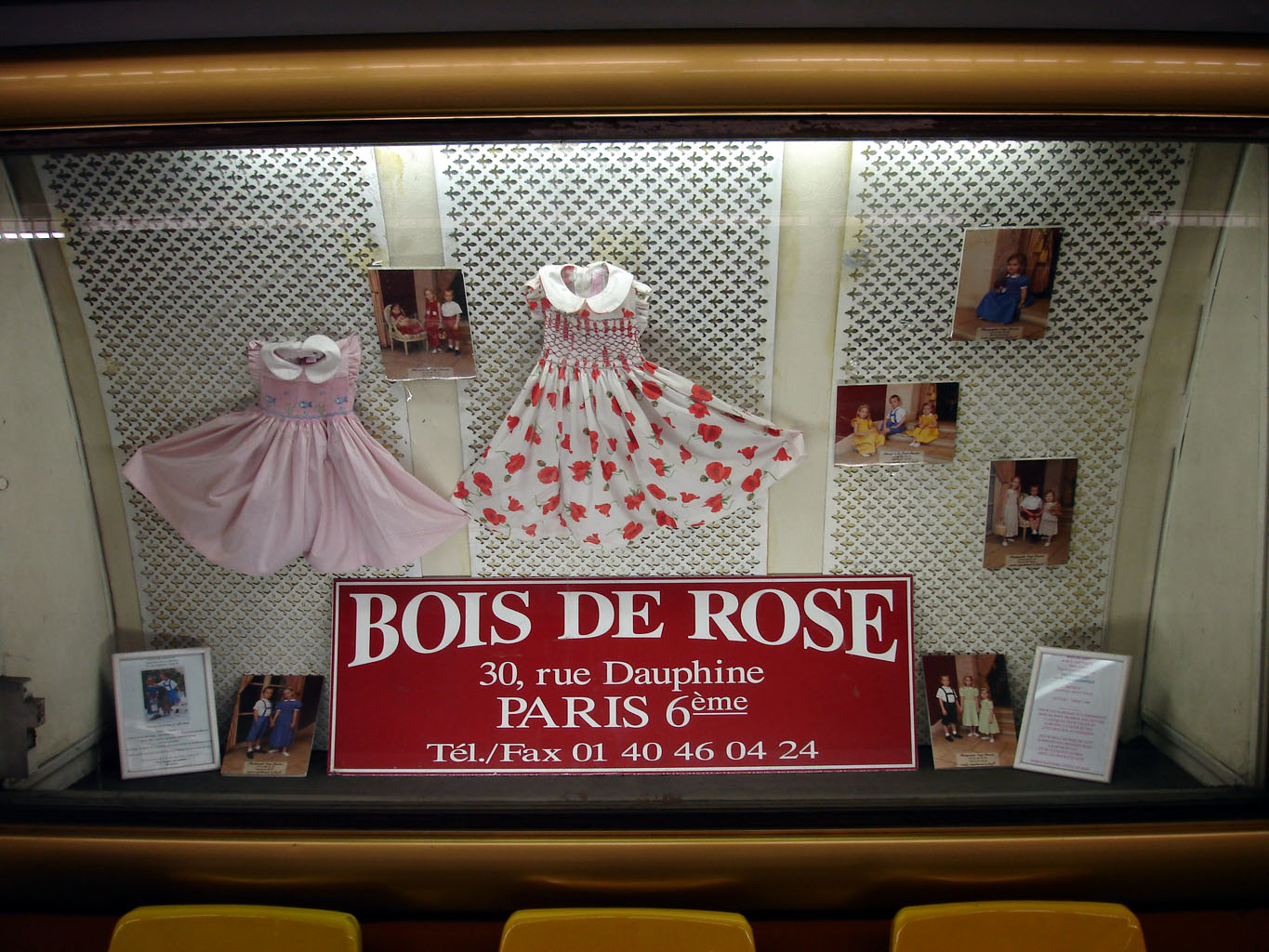 La station Franklin D. Roosevelt de la ligne 9 du métro de Paris, France